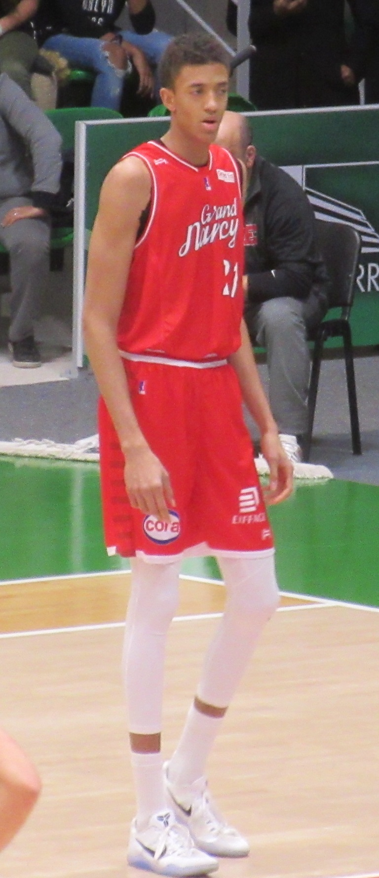 Jonathan Jeanne avec le maillot de Nancy